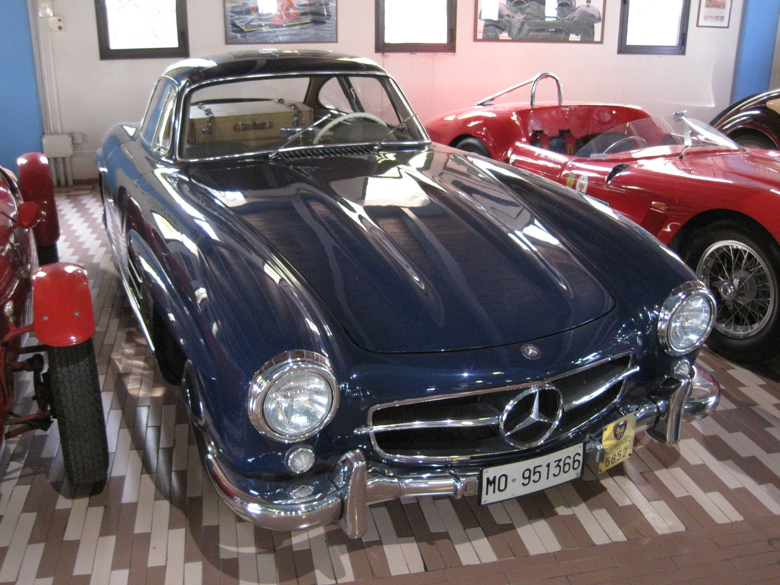 Automobiles in Panini Maserati Museum in Modène